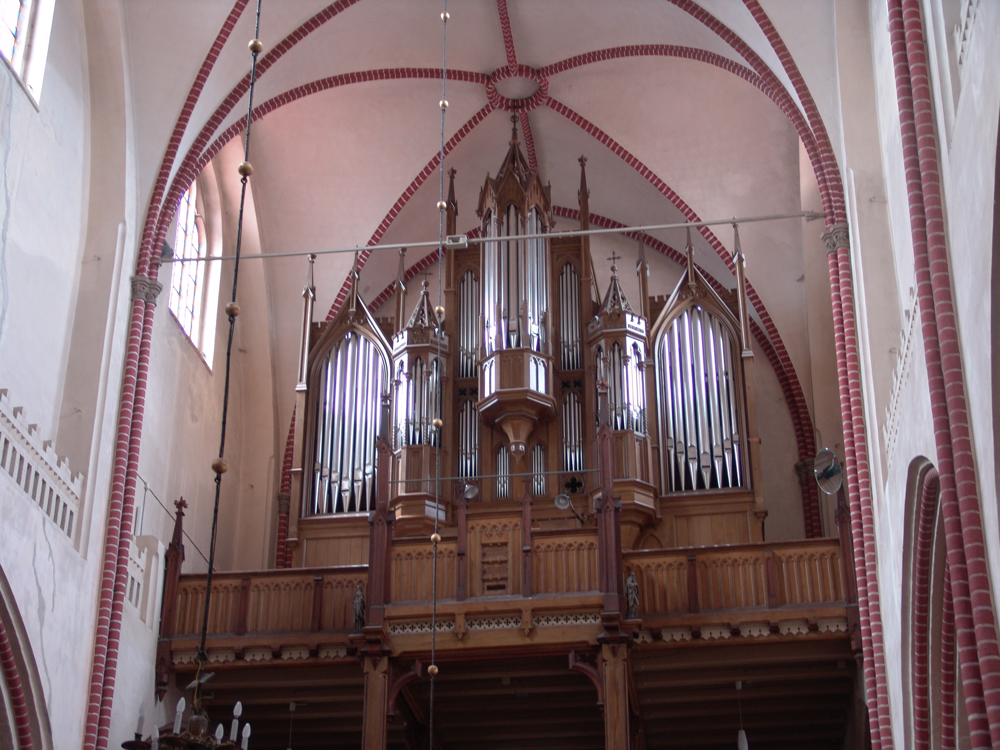 Georgenkirche Waren